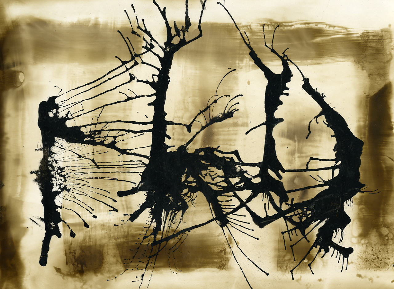 Serie fotografica : Italia, 1970 / Paolo Monti. - Stampe: 3 : Chimigramma, gelatina bromuro d'argento/ carta, 18x24, 24x30. - ((Al verso di una stampa "progetto" di chimigramma e iscrizione inventariale manoscritta a matita: "BN/113". - Sul coperchio della scatola iscrizione didascalica manoscritta a pennarello nero: "6CH".